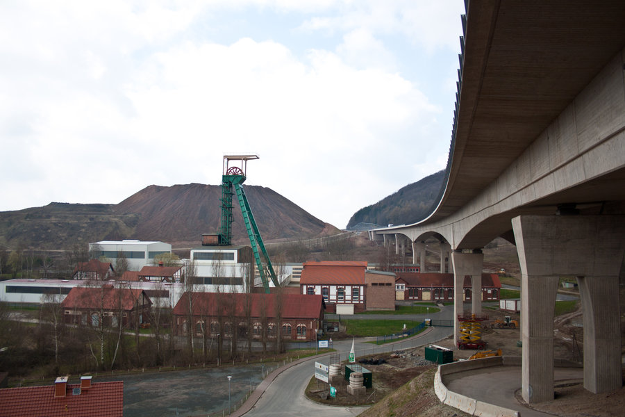 Förderturm und Friedetalbrücke